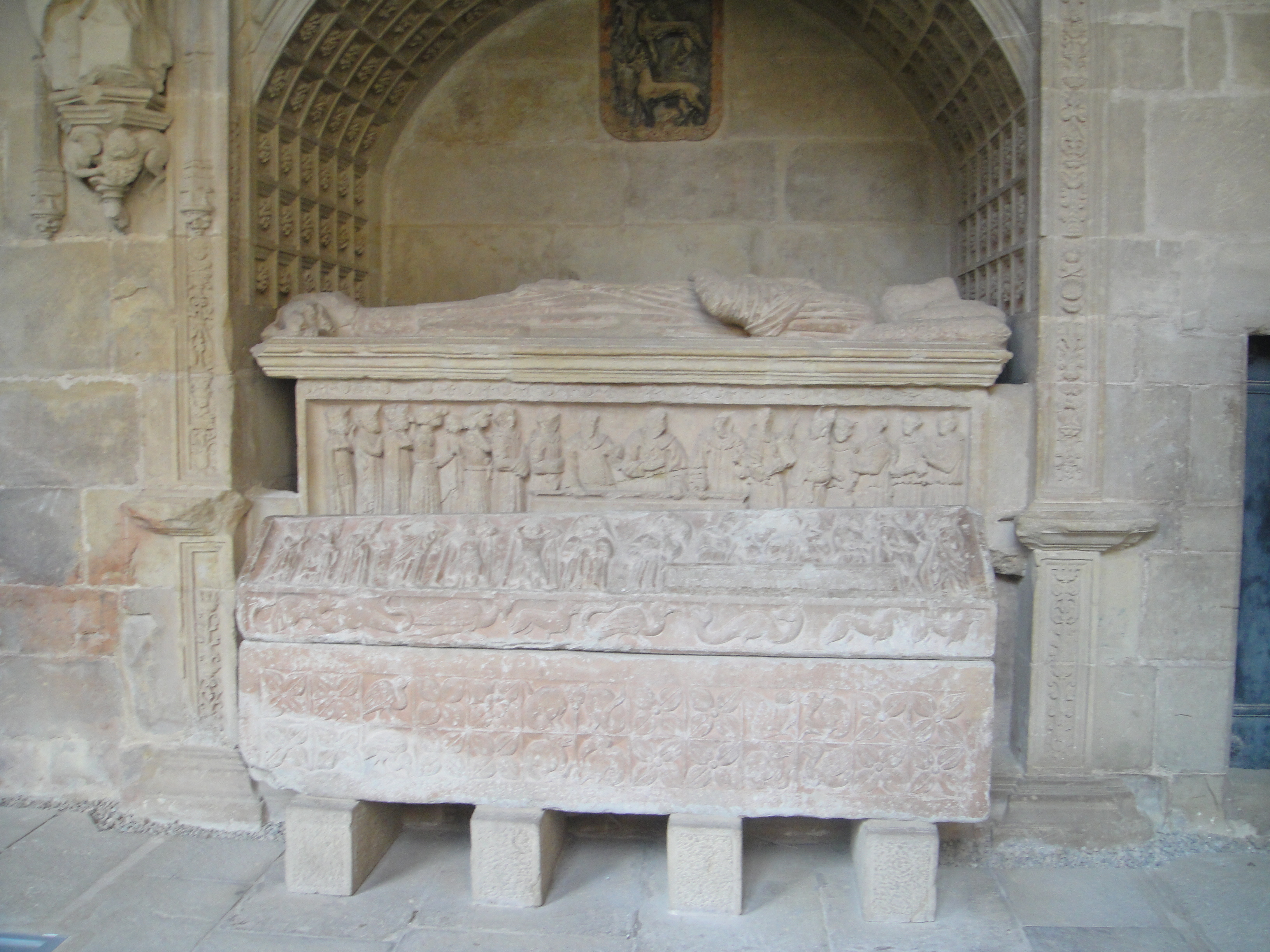 Sepulcros de Diego López II de Haro († 1214), señor de Vizcaya, y de su esposa. Monasterio de Santa María la Real de Nájera. La Rioja, (España).